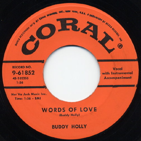 Es una foto del sencillo "Words of love" por Buddy Holly.